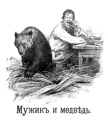 Первая страница сказки «Мужик и медведь». Собрание родных сказок по Афанасьеву. Рис. Ягужинского С.И. 1912 г. Часть.1.